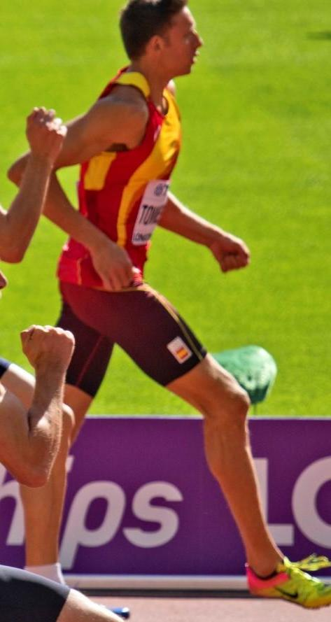 d7_2 vdpl 100m